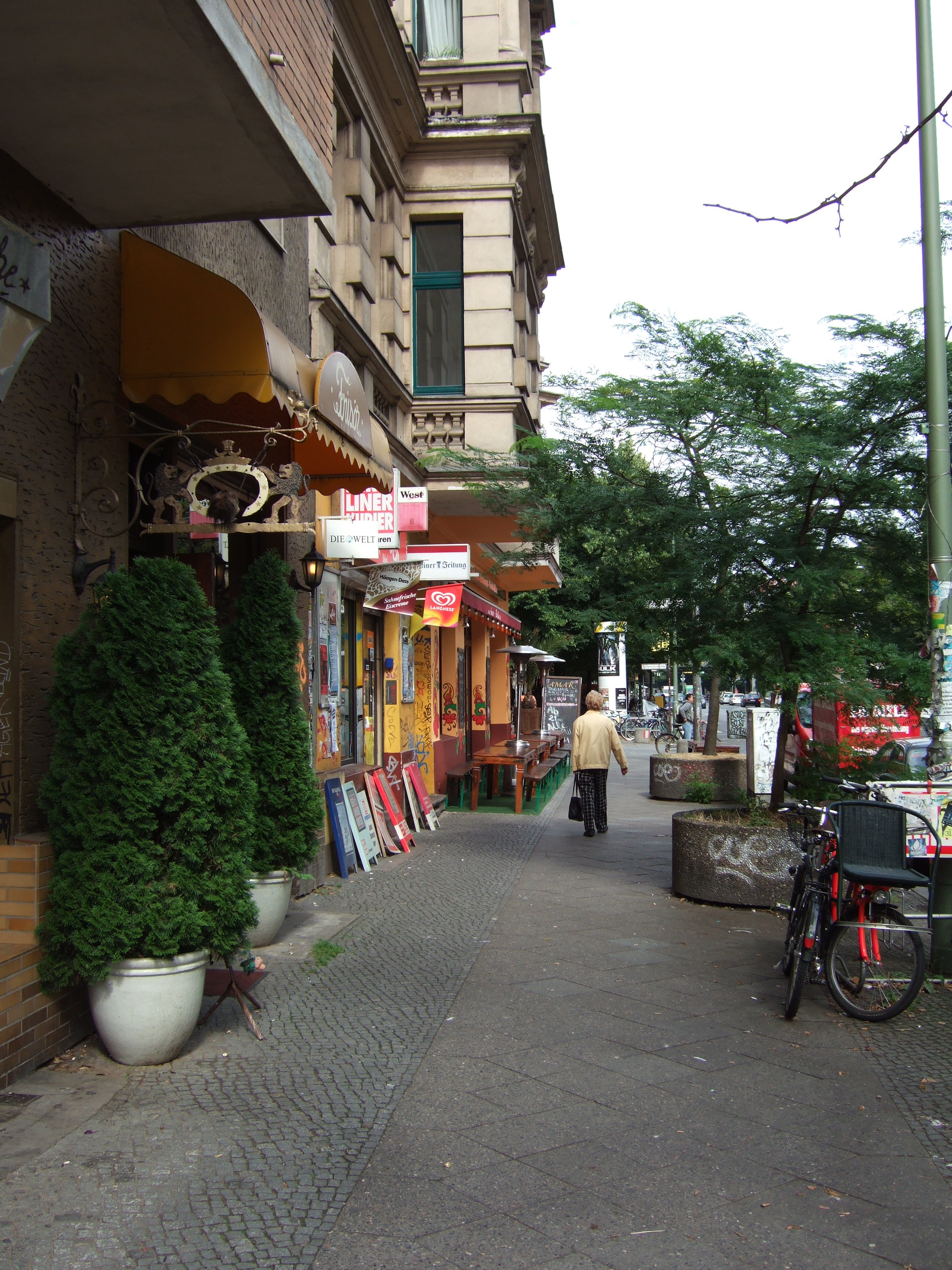 Schlesische Straße 2008 01